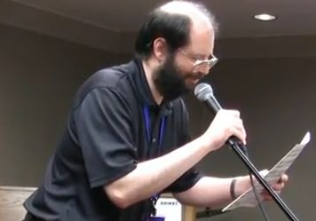 Ragtime-pianisti ja säveltäjä Tom Brier.